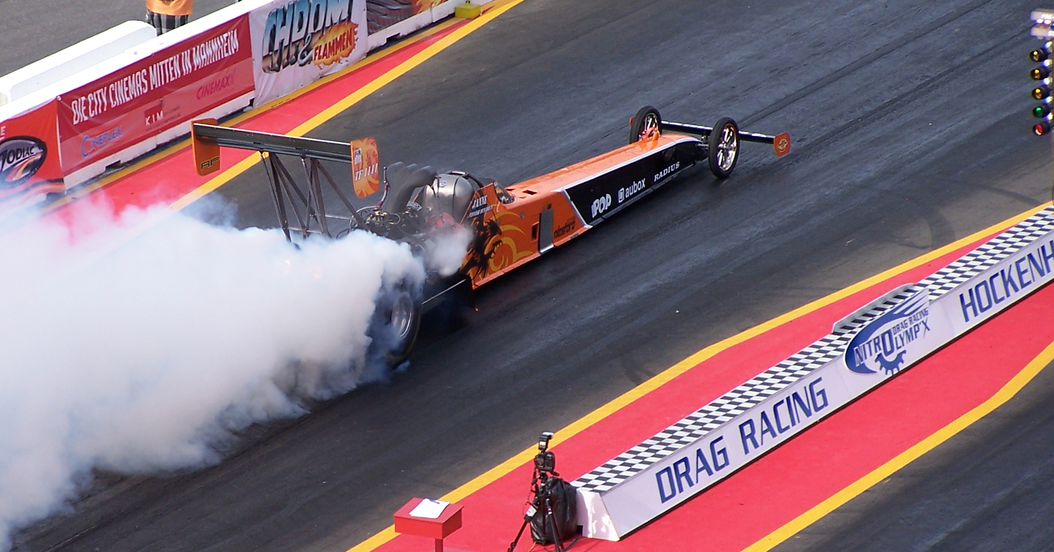 Janne Ahonen in seinem Dragster beim Burnout zum Start in der "Top Fuel"-Klasse in Hockenheim am 14. August 2010 bei den NitrolympX